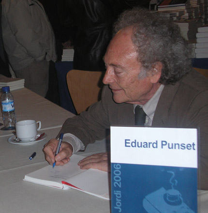 Imagen de Eduard Punset tomada el 23/04/2006 mientras firmaba sus libros en la celebración de Sant Jordi, en Barcelona.